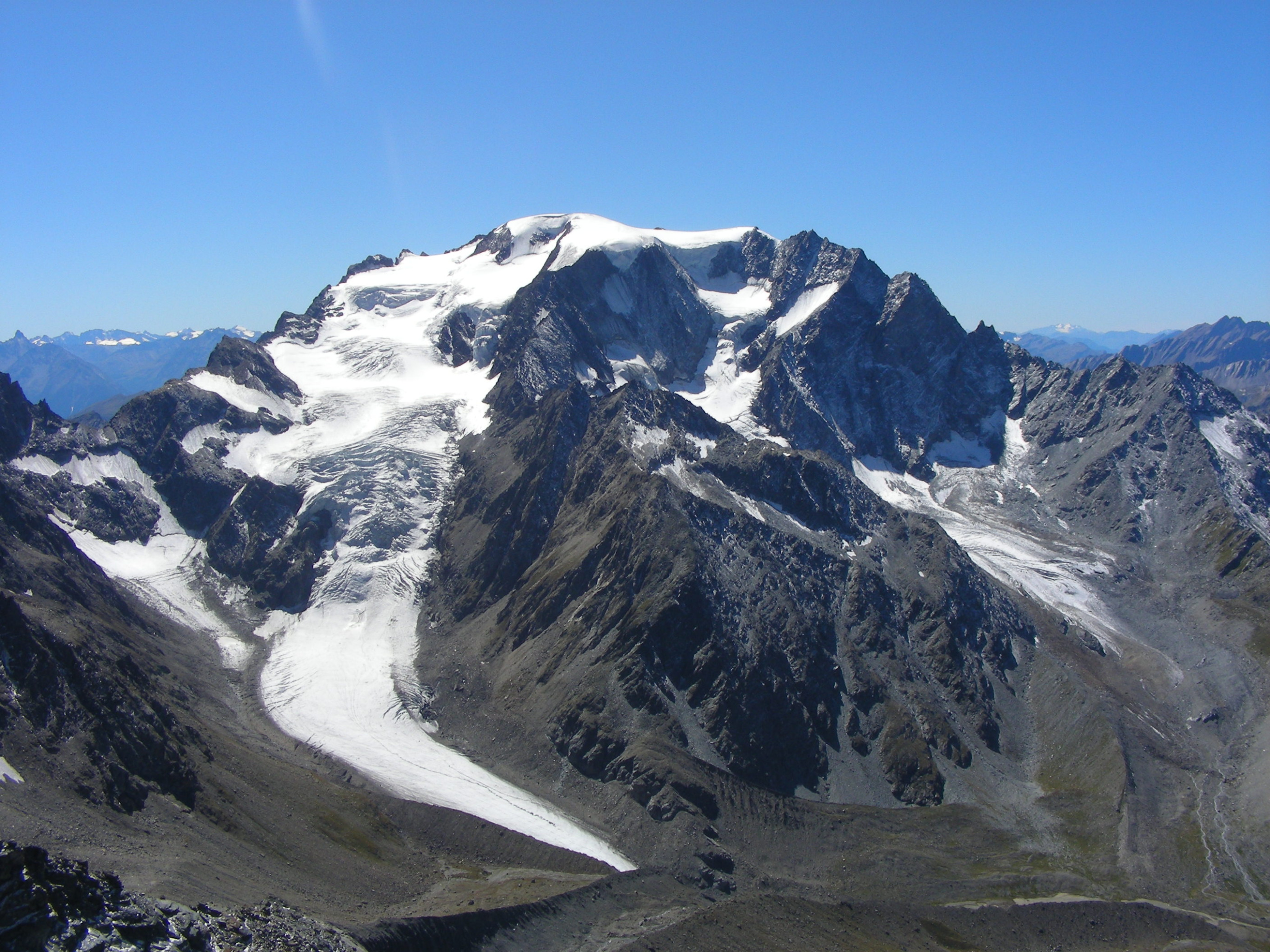 Le Mont Vélan vu depuis Meitin.